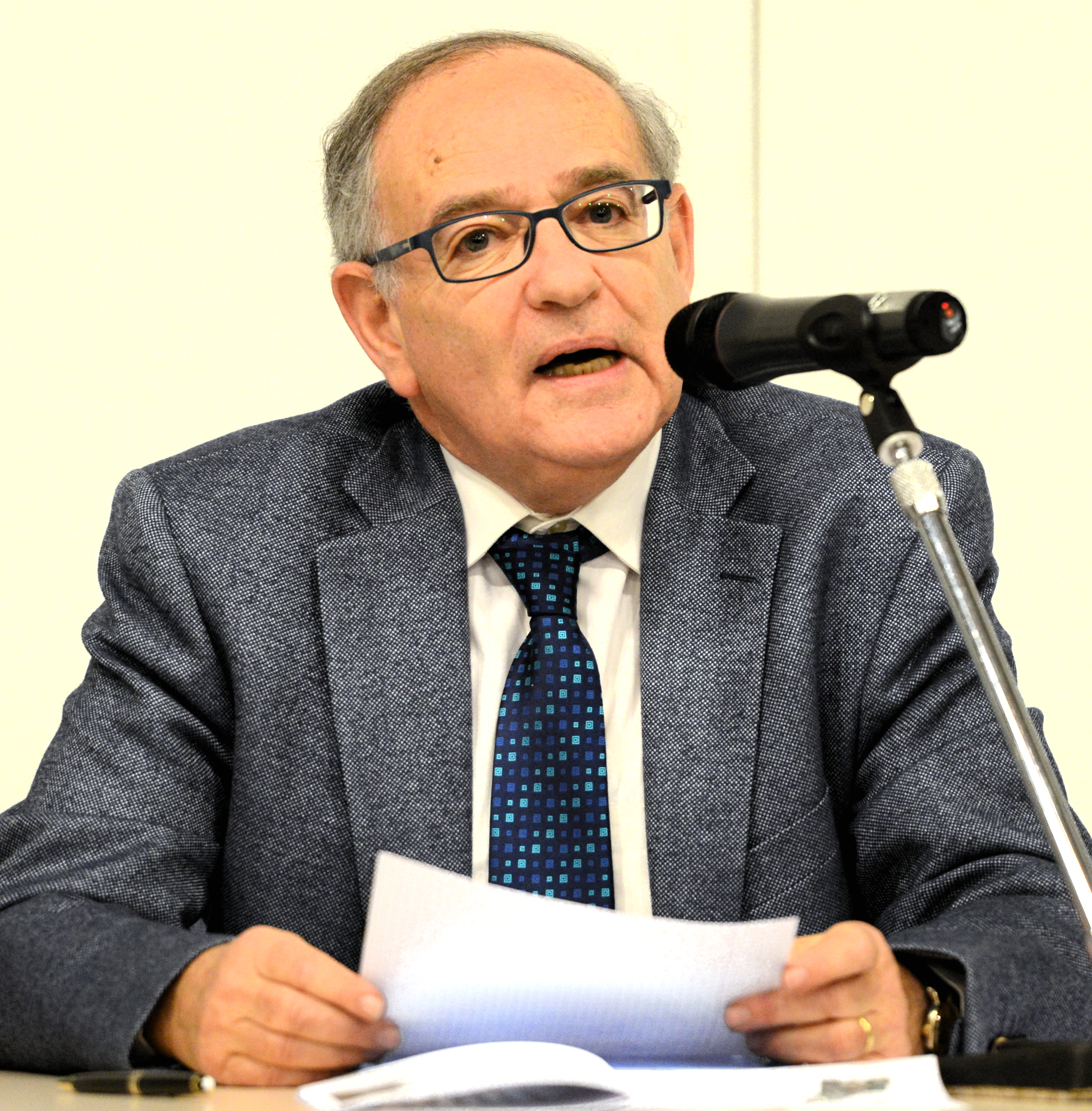 Podiumsdiskussioun «Iwwer d’Konsequenze vun Antisemitismus a Juddeverfolgung am politischen Discours zu Lëtzebuerg, 1945-2014» D'Konferenz gouf den 10. Dezember 2014 am Centre Prince Henri zu Walfer gehalen. Se war organiséiert vu MemoShoah Lëtzebuerg an Zesummenaarbecht mat der Fondation Robert Krieps an den Témoins de la 2ème génération. Den Alain Meyer, fréiere President vum Staatsrot, huet d'Diskussioun moderéiert.